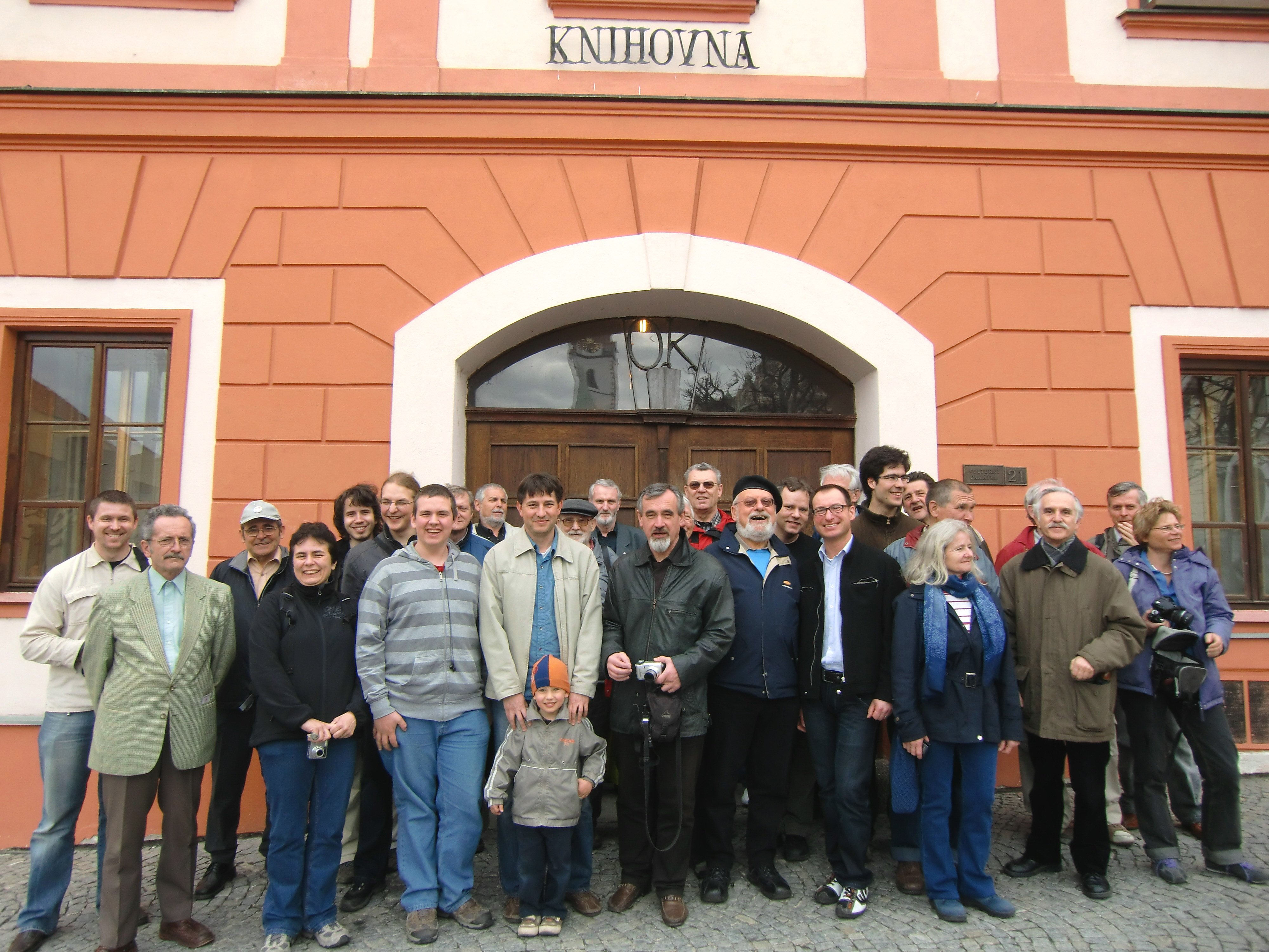 La V-a Sabla Printempo 2010 (internacia trejnseminario "Esperanto kaj Interreto" en Písek, Ĉeĥio). 10.4.2010 - komuna foto de la partoprenantoj antaŭ la urba biblioteko, post vizito de la ekspozicio "Ĉu Esperanto estas morta lingvo?"